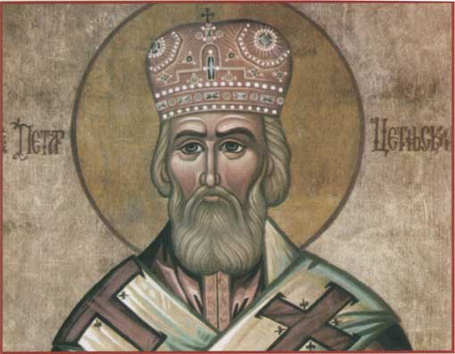 St. Petar of Cetinje (Petar I Petrovic Njegos)